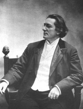 Anton Seidl